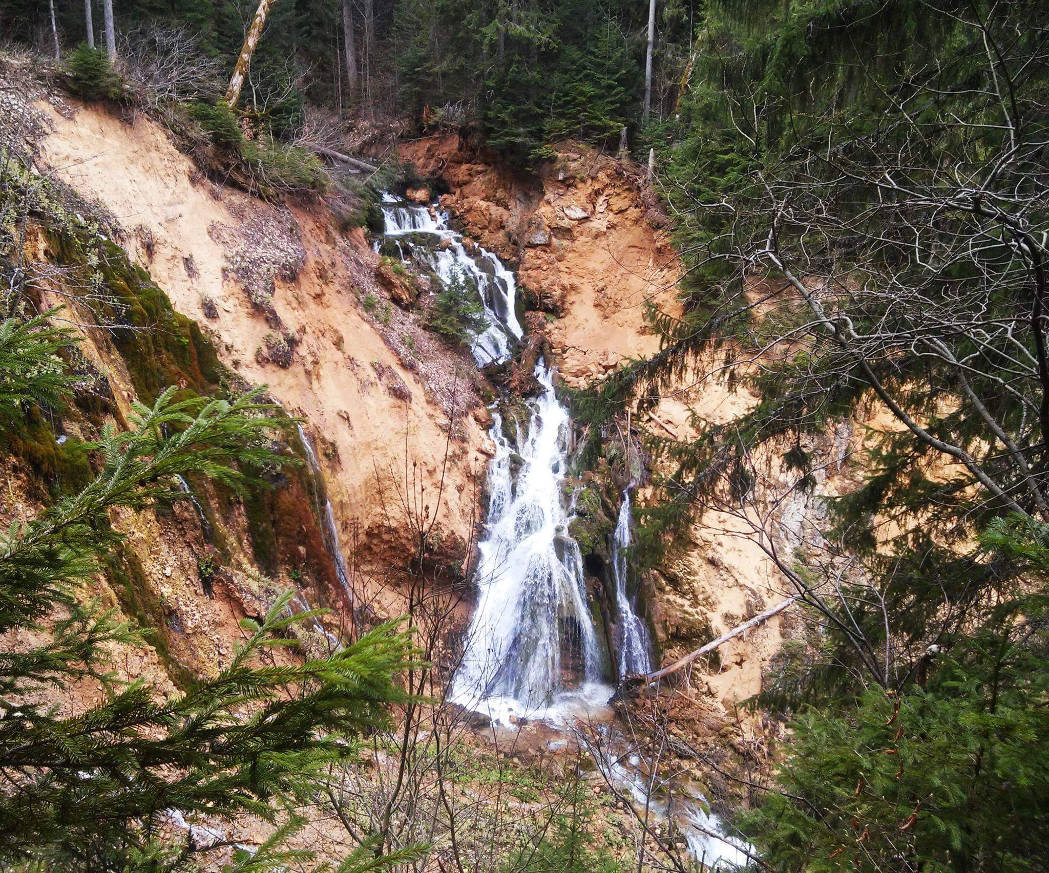 Водопад у селу Жеравице, Хан Пијесак. Ауторска права предата су мени од стране господина Тодић Цвика, као и одобрење за објављивање на Википедију.